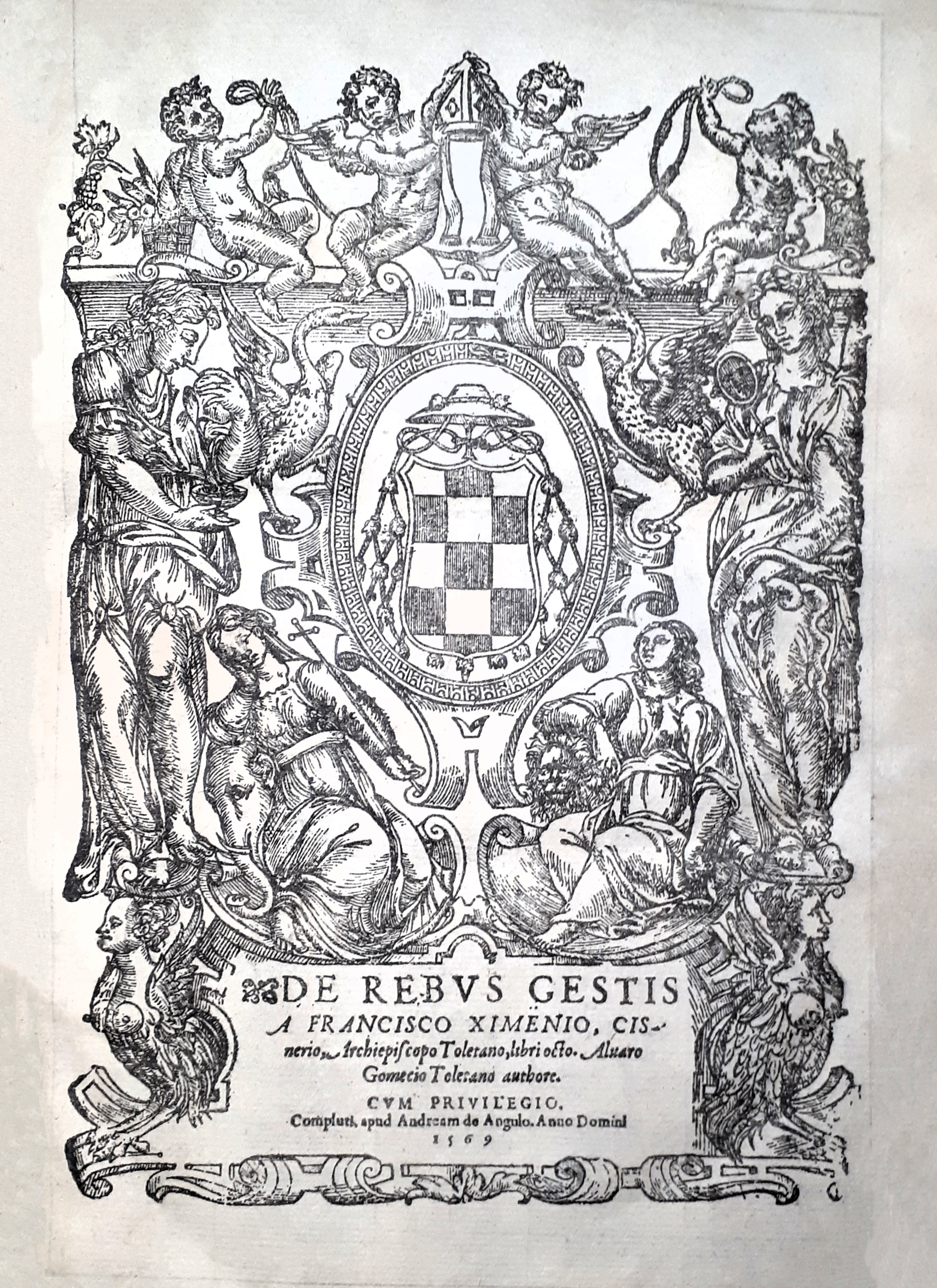 Portada del libro “De rebus gestis“, publicado en latín por Alvar Gómez de Castro, en 1569, en Alcalá de Henares. Es la primera edición de la biografía oficial del cardenal Francisco Jiménez de Cisneros (1436-1517) fundador de la Universidad de Alcalá y regente en dos ocasiones de la Corona de Castilla. [1]